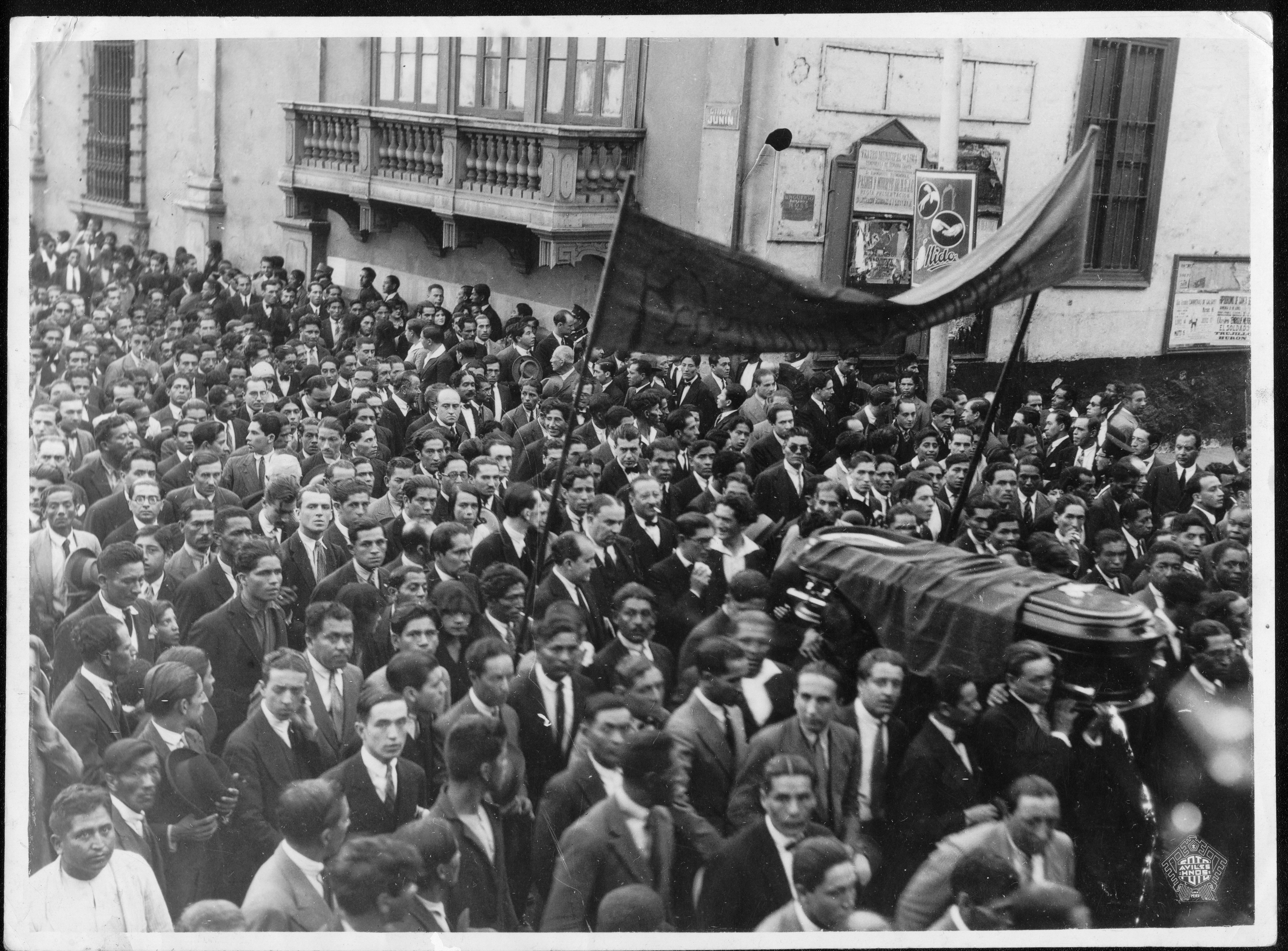 El feretro pasando por la esquina de la Plaza de Armas y la calle Pescaderia. En la parte superior se ve uno de los balcones del antiguoPalacio de Gobierno. Puede usarse libremente bajo licencia CC mencionando en los créditos "Archivo José Carlos Maríategui, Lima, Peru (